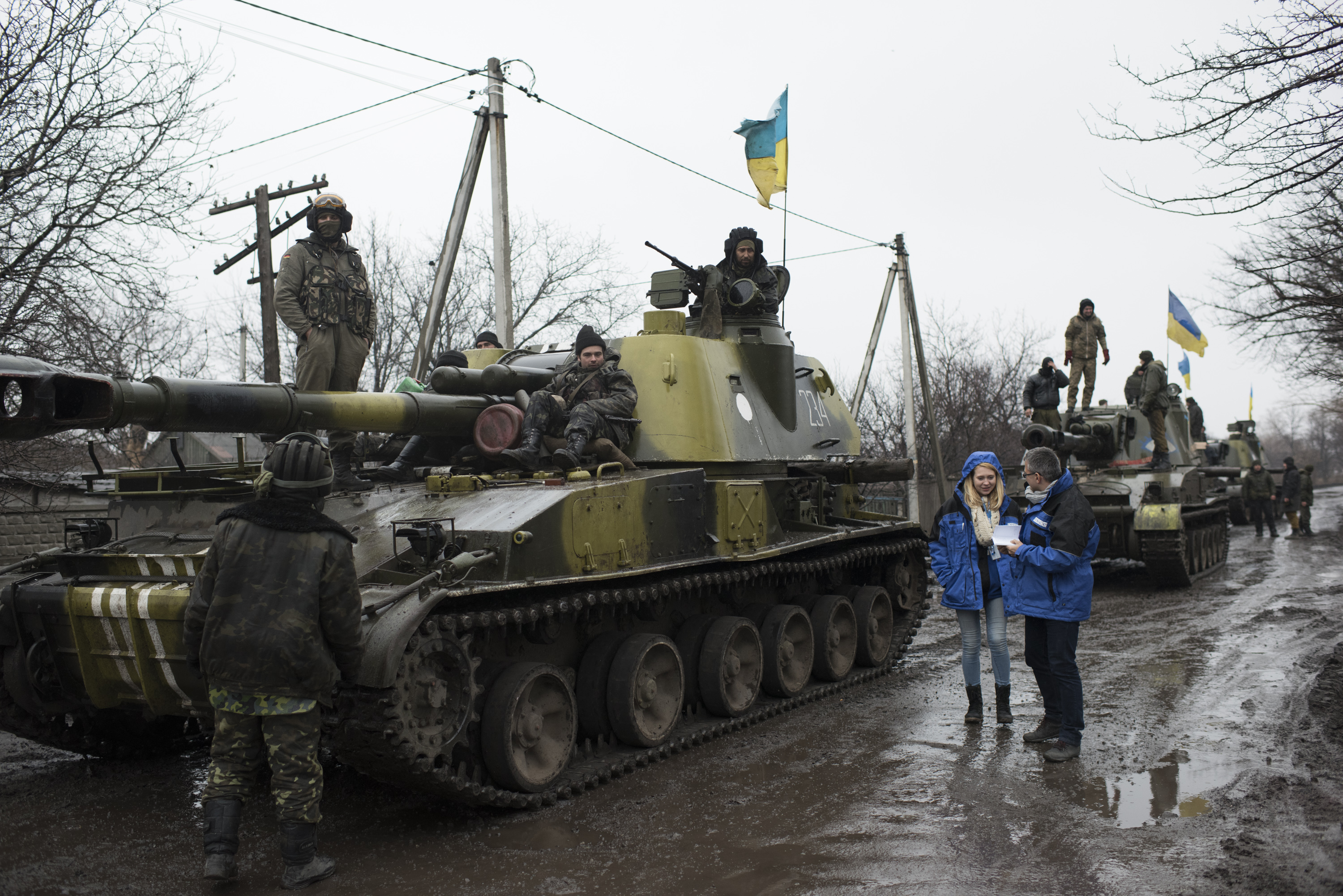 March, 2015